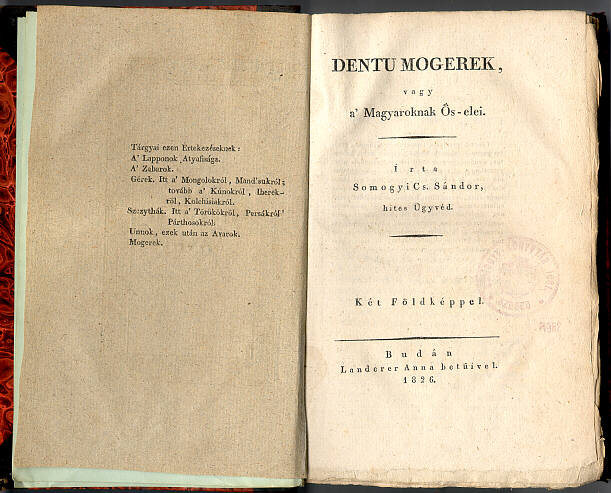 Somogyi Cs. Sándor könyve